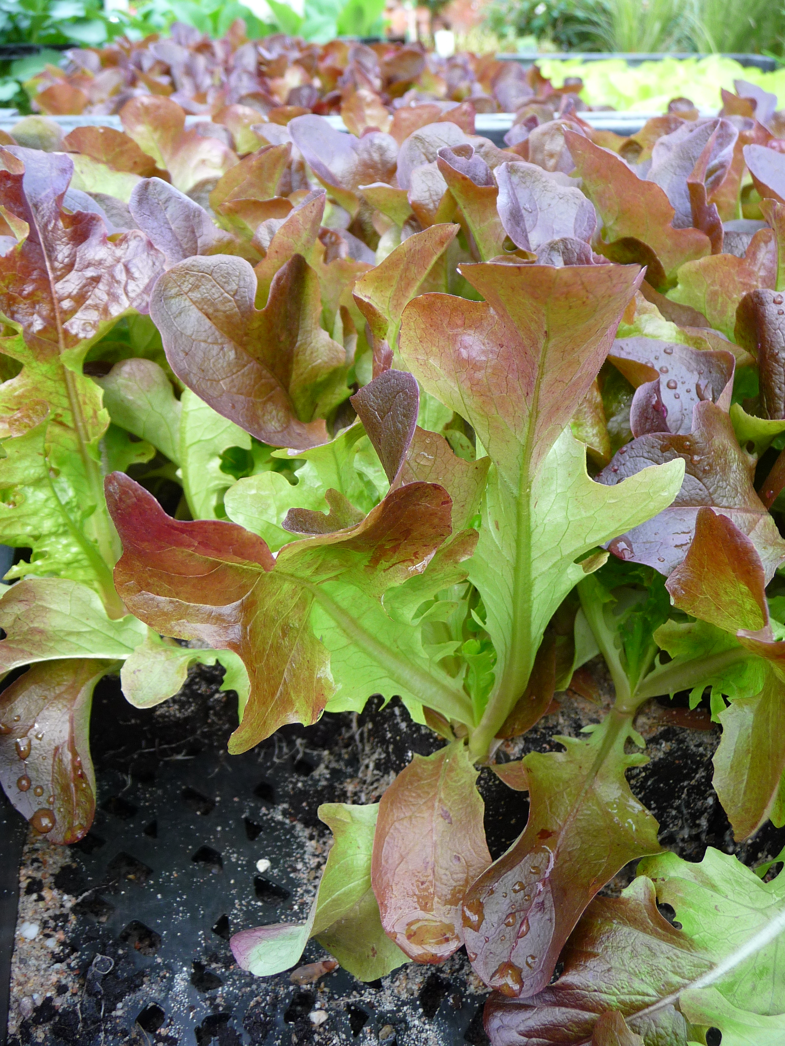 Setzlinge Eichblattsalat (Lactuca sativa var. crispa), fotografiert in Deutschland)